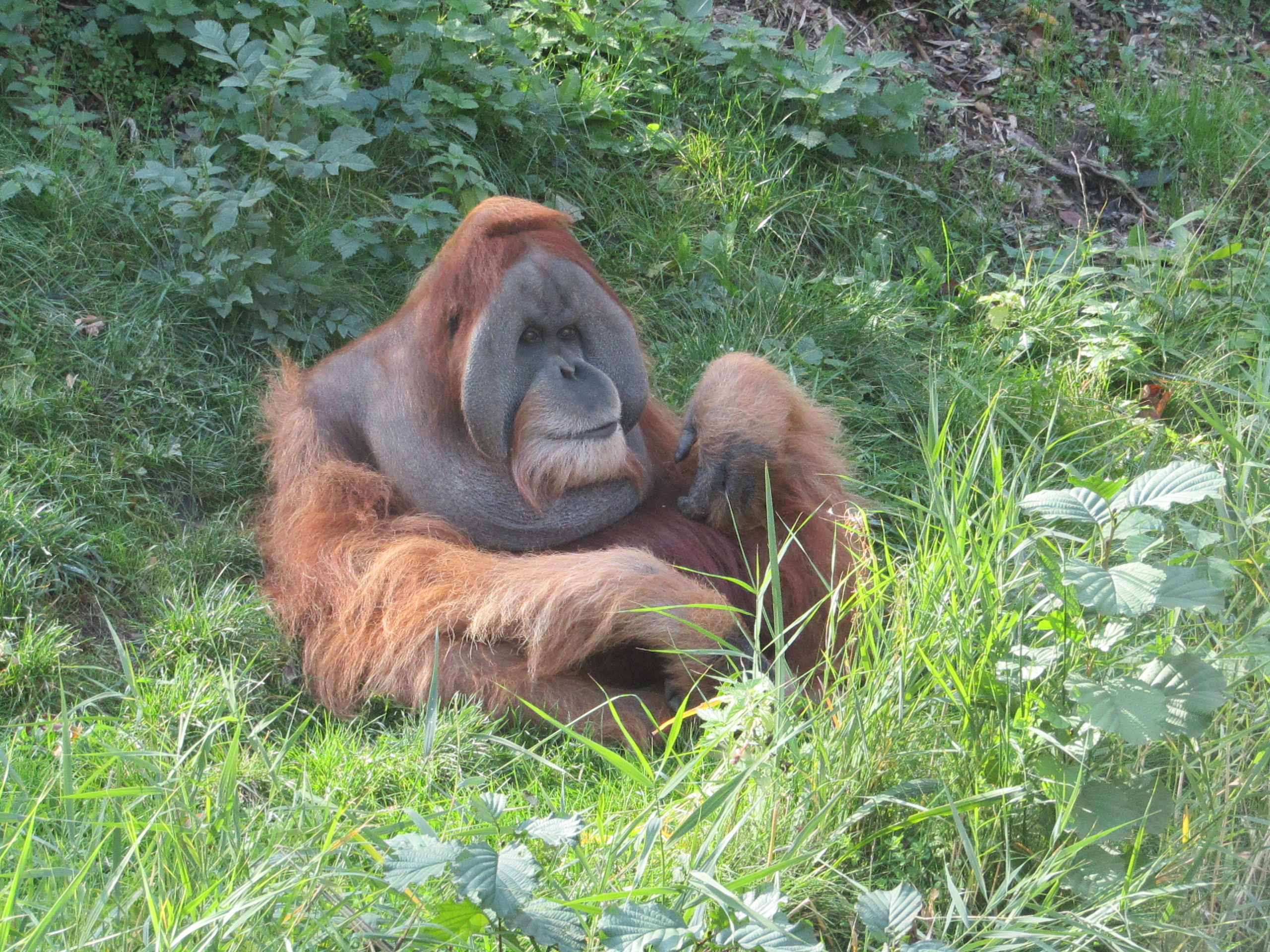 Nahaufnahme des männlichen Sumatra-Orang-Utans Bimbo im Pongoland des Zoos Leipzig